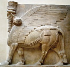 Taureau androcéphale, de profil gauche, Dur-Sharrukin, redimensionné à partir de